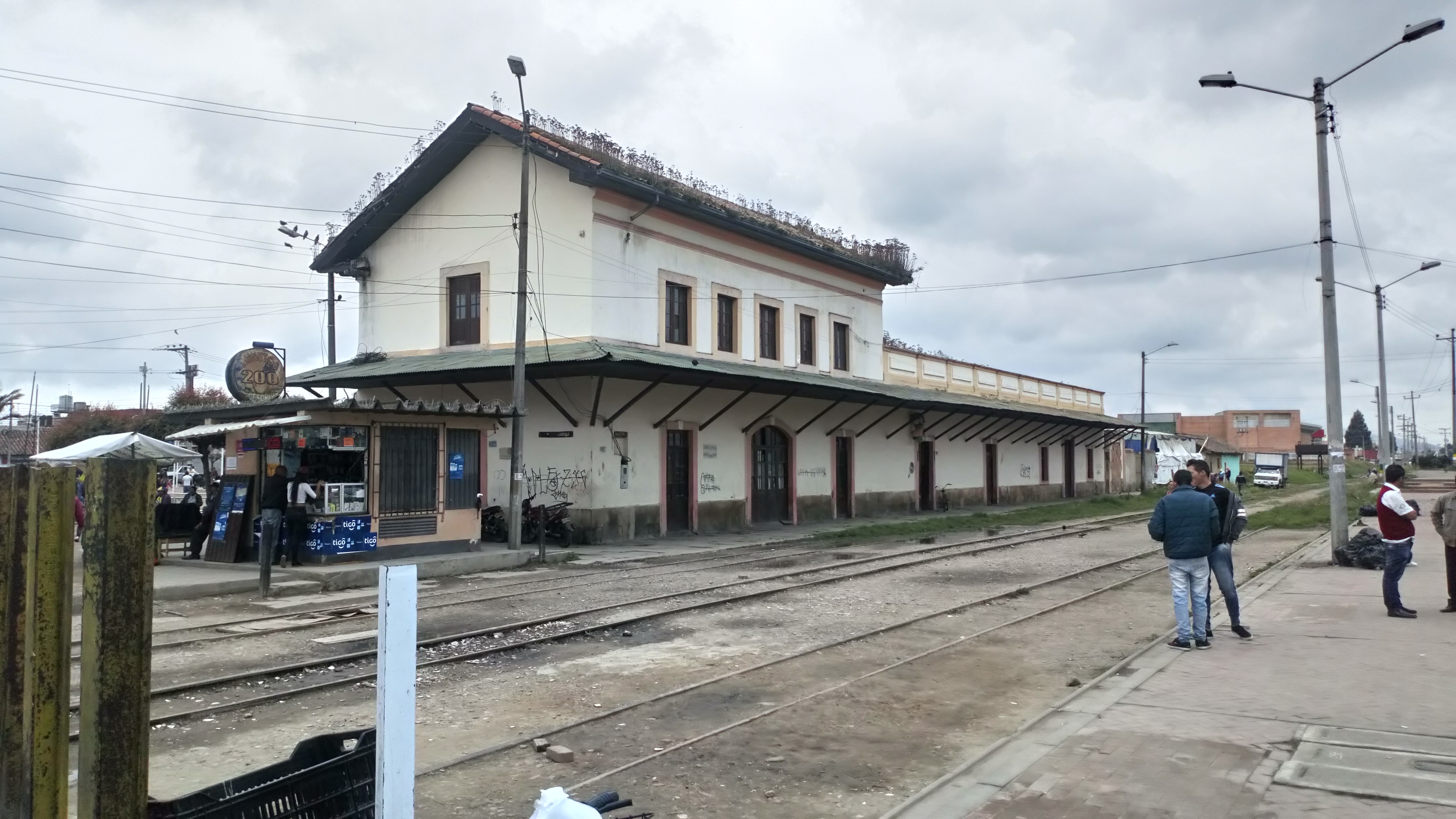 Estación del Ferrocarril de Madrid, Cundinamarca